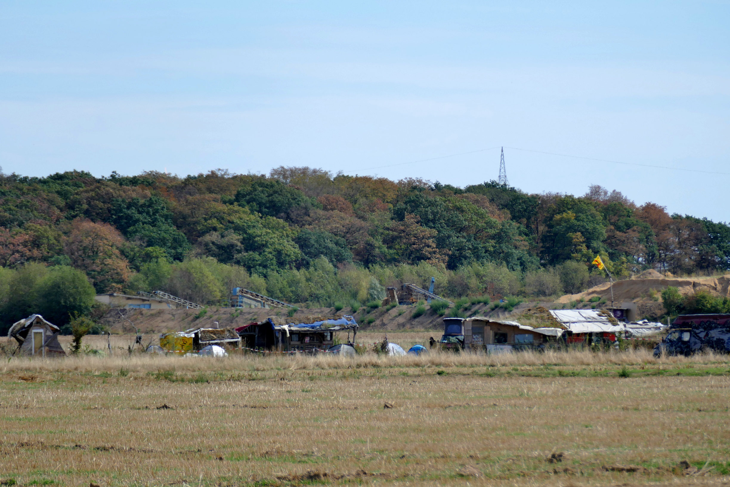 Protestcamp am Rand des Hambacher Forsts bei Morschenich